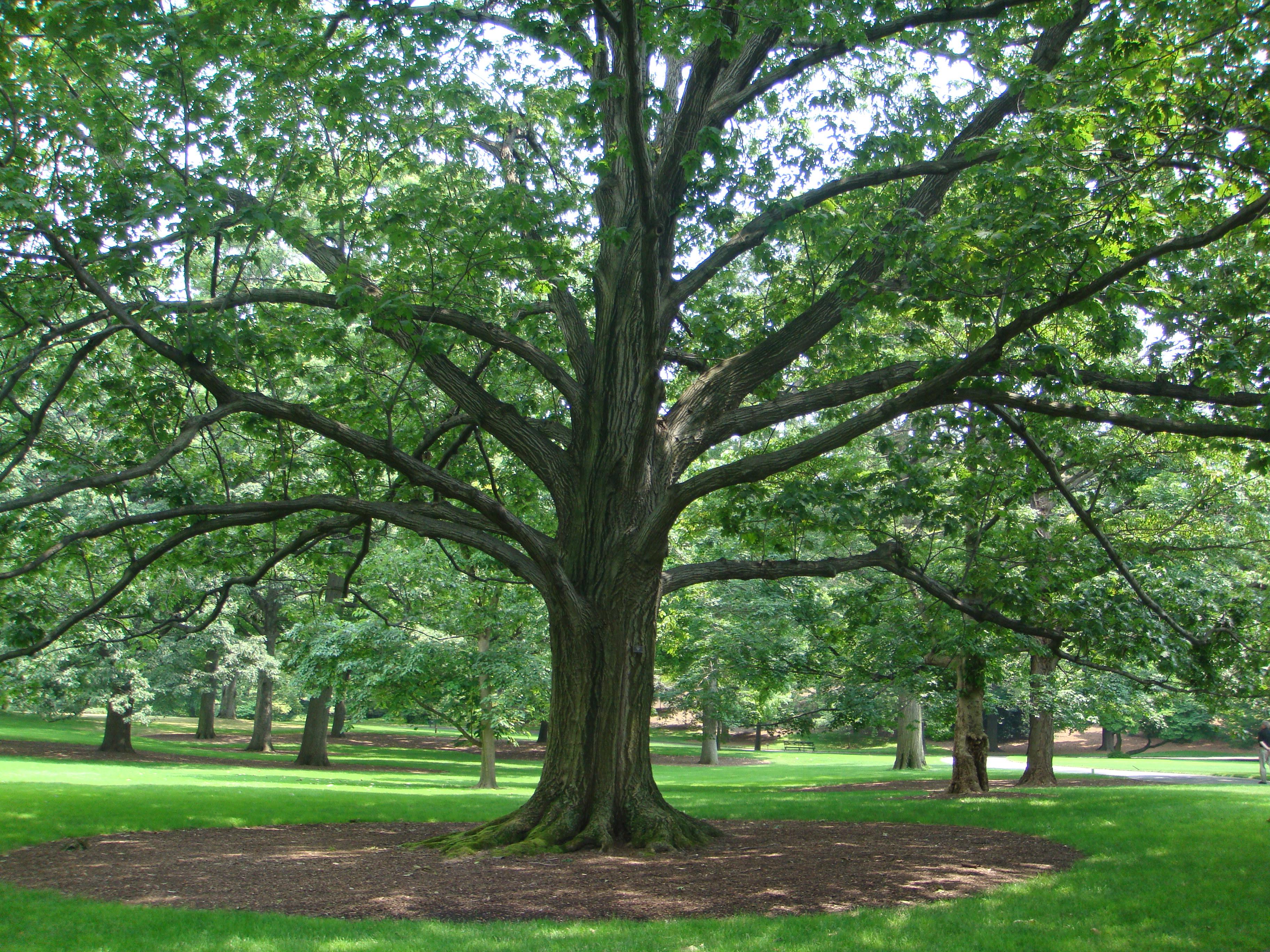 Beautiful tree